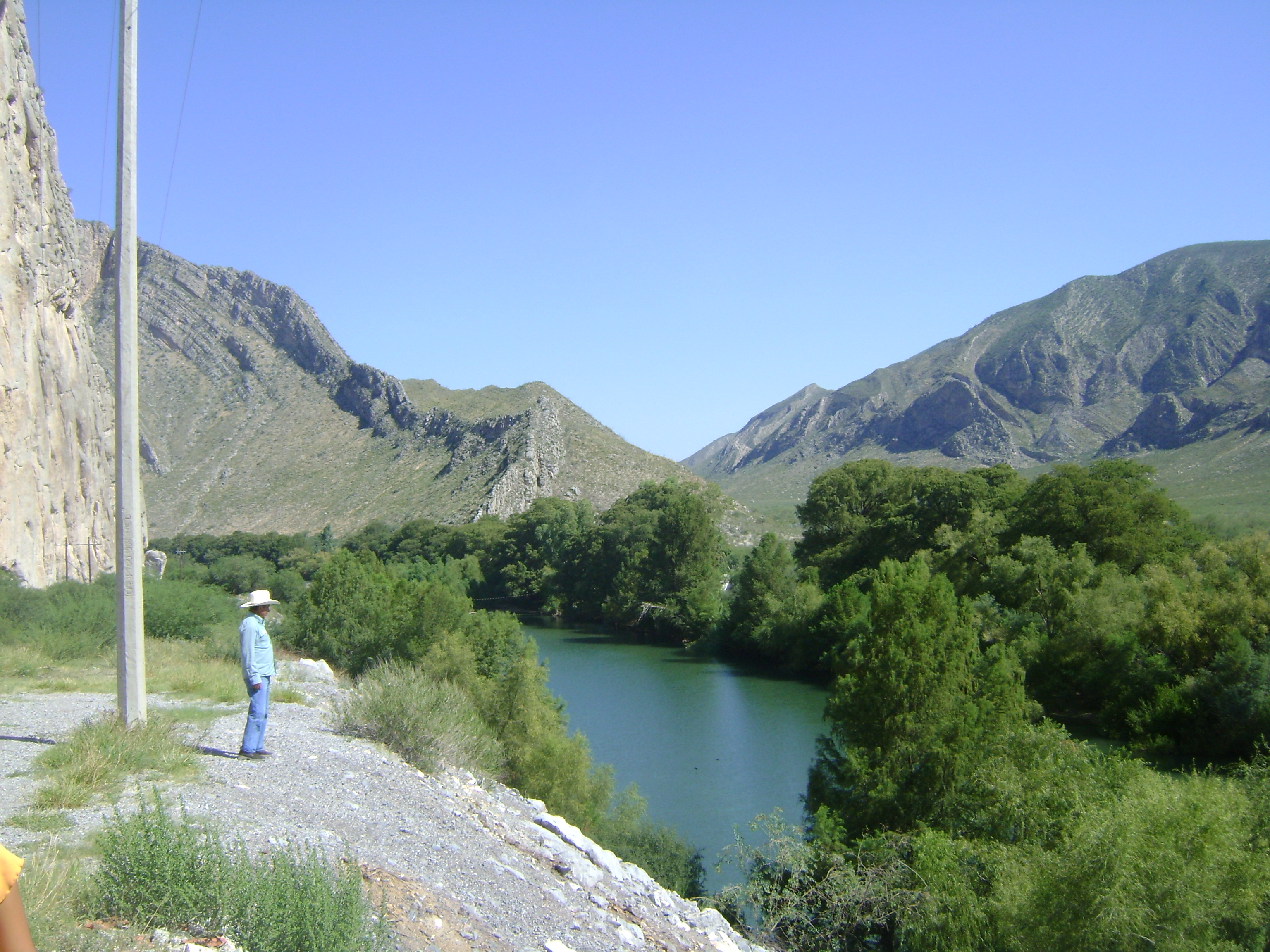 Cañon de Fernandez